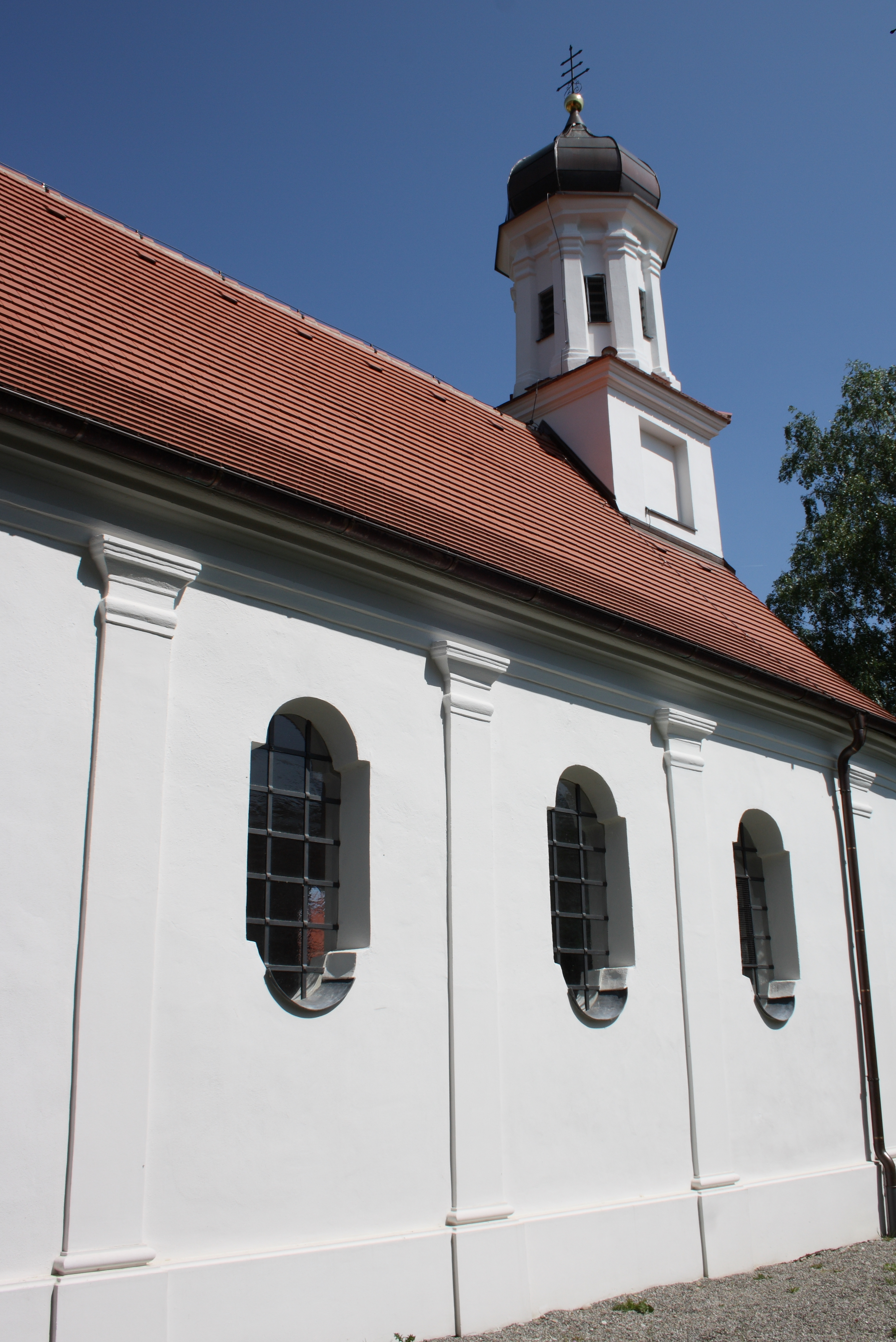 Katholische Filialkirche Heilig Kreuz in Kühlenthal, einer Gemeinde im Landkreis Augsburg (Bayern)